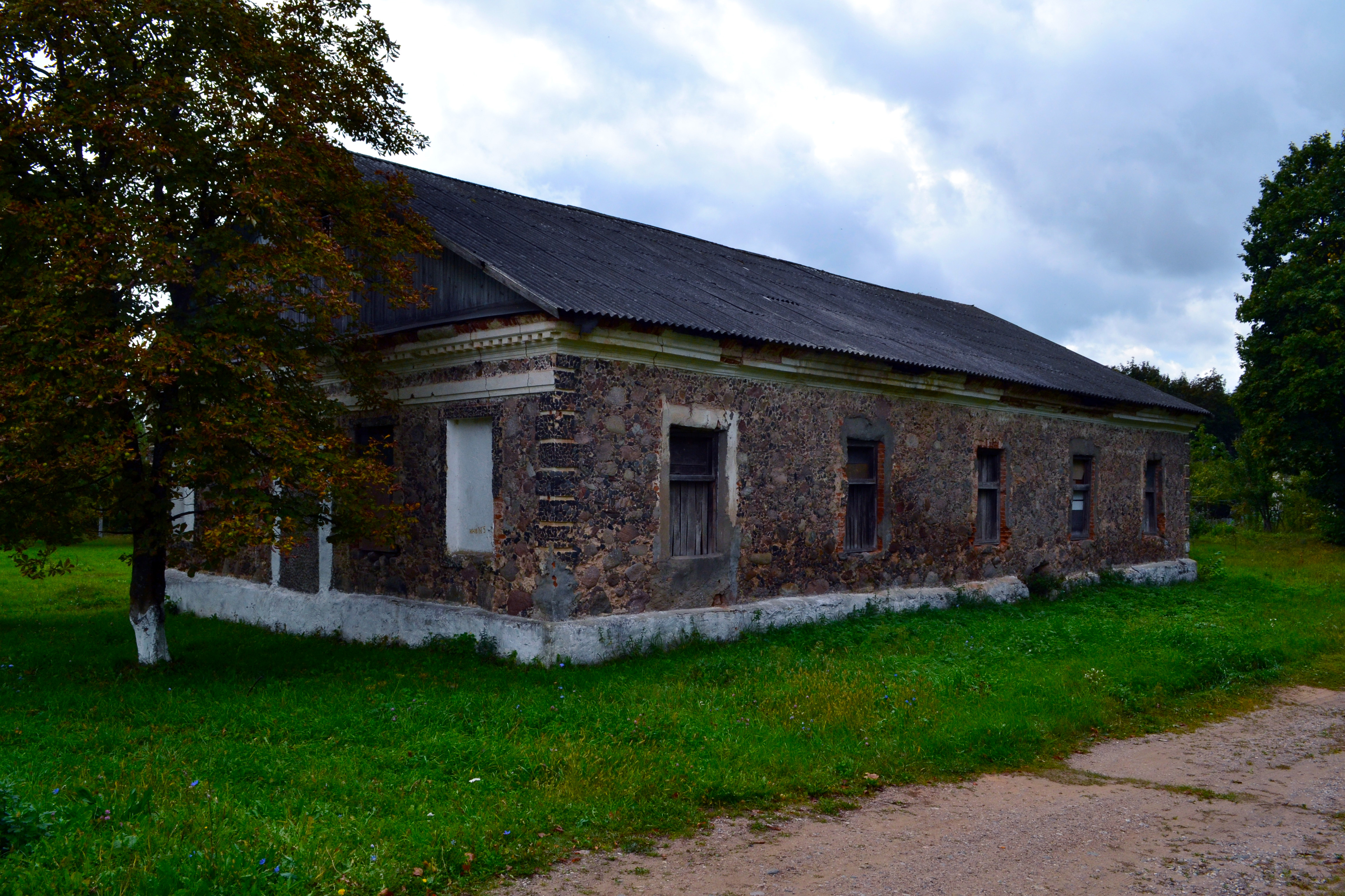 Беларуская (тарашкевіца): Сядзіба Завішаў «Кухцічы» (мяст. Першамайск, Узьдзенскі раён) This is a photo of Belarusian heritage monument. Reference number: 612Г000628 ( WLM)